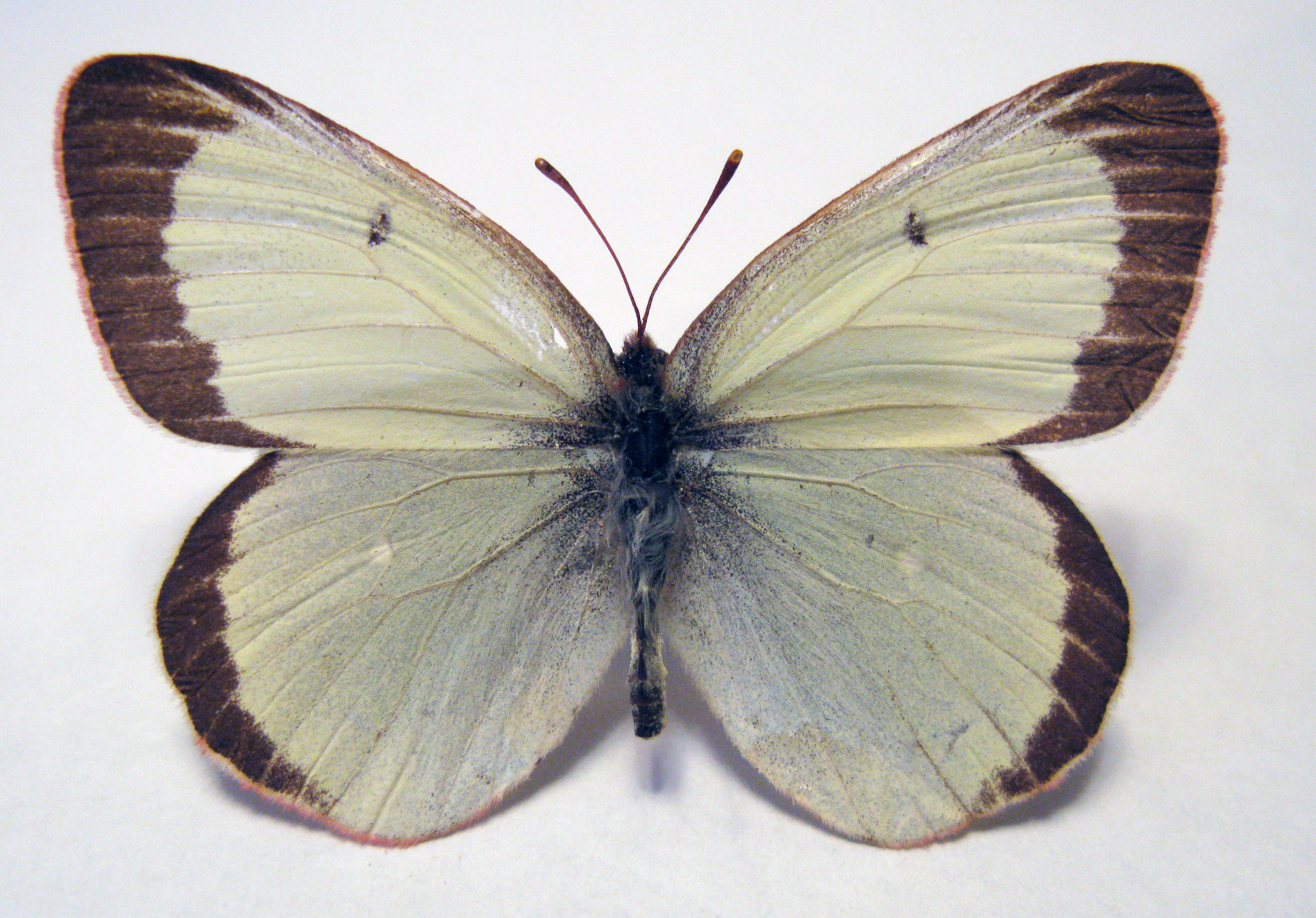 Желтушка Марко Поло (лат. Colias marcopolo)